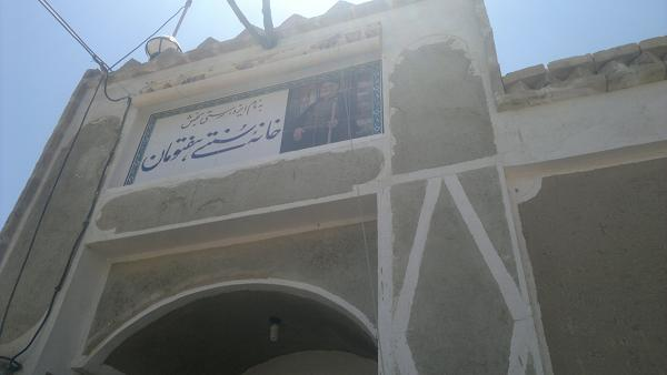 خانه سنتی هفتومان